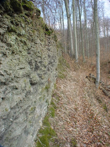 Alt-Morungen public domain „eigenes Foto von 2004“ (Aus Diskussion übertragen von Leipnizkeks)